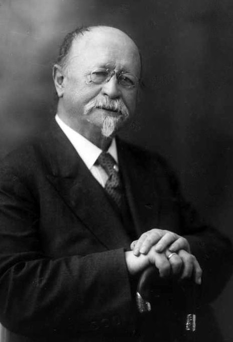 portrett, mann, instrumentmaker, stående halvfigur.